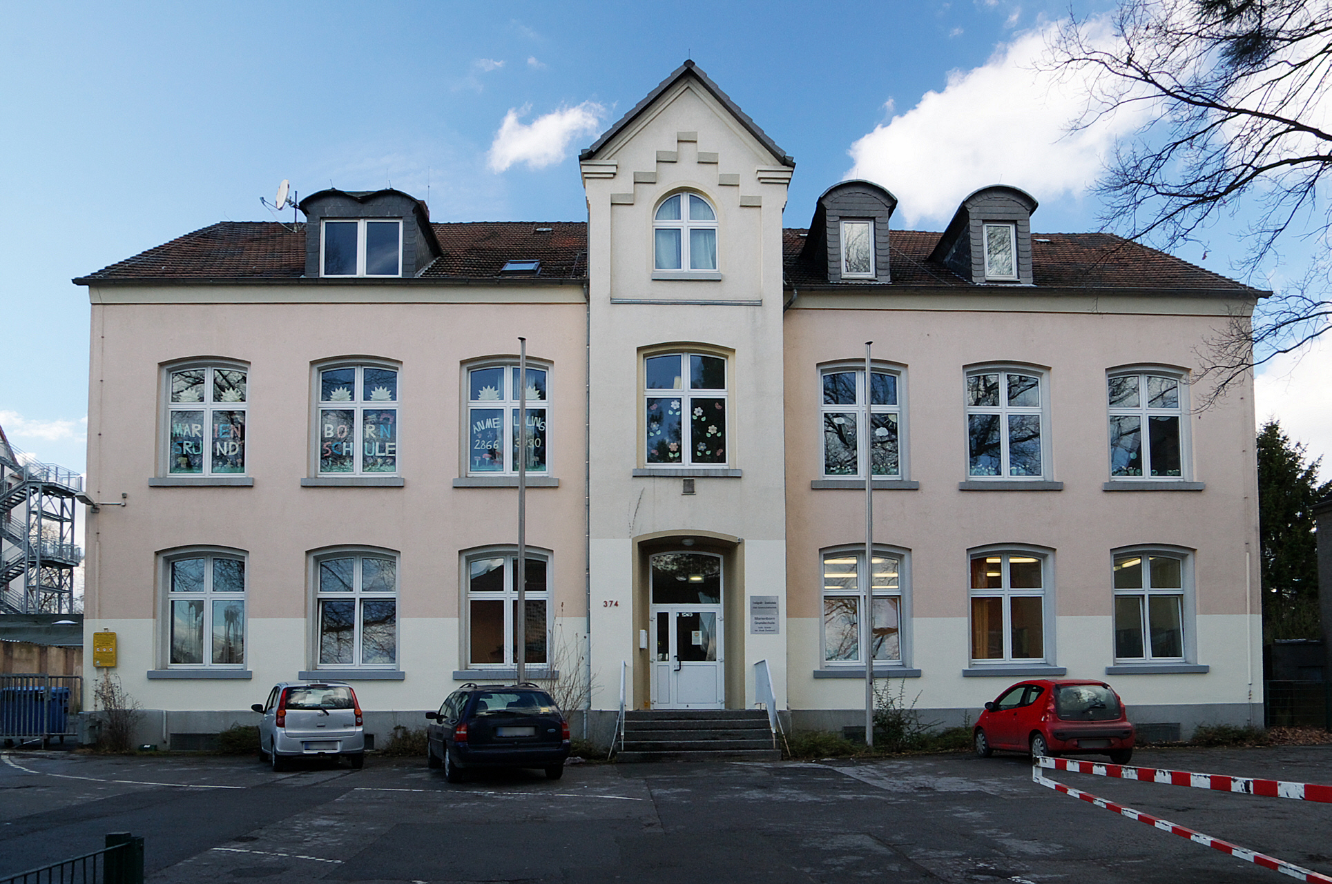 Marienborn-Grundschule Dortmund-Bövinghausen